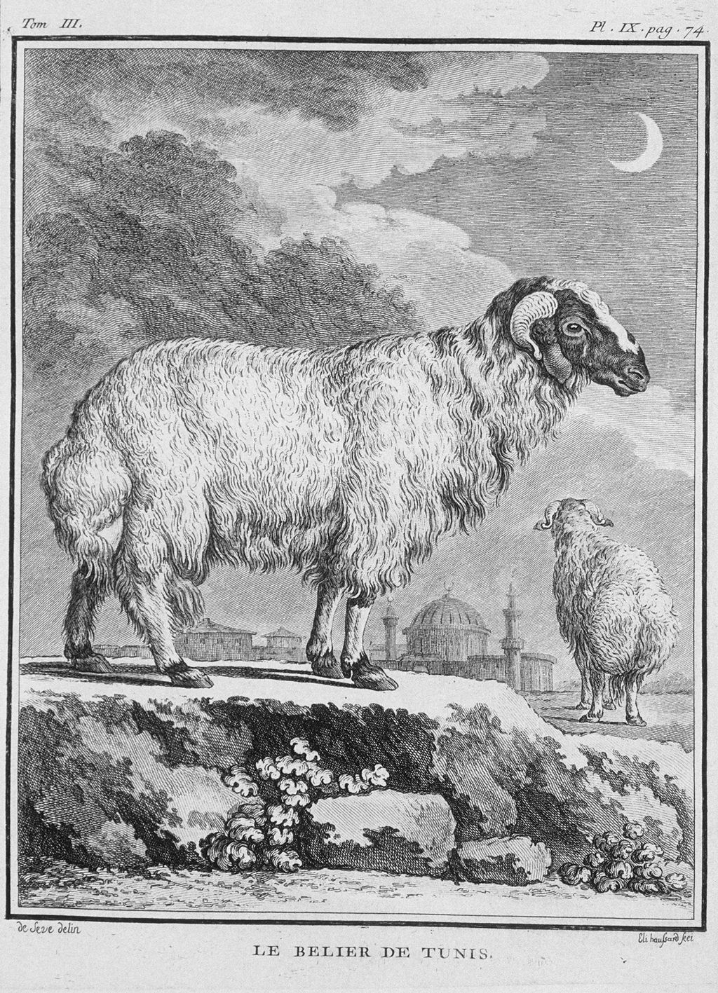 Le bélier de barbarie à grande queue appelé Bélier de Tunis